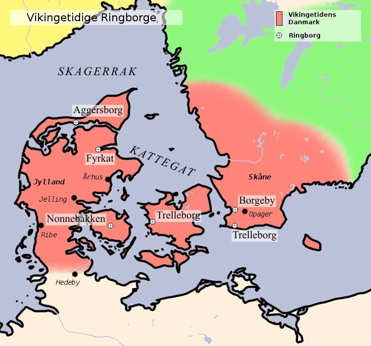 Vikingetidige ringborge